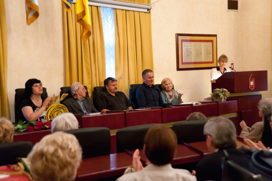 XII. jadranski književni susreti, Crikvenica. Sudionici: Ljerka Car Matutinović, Mirko Ćurić, Darko Pero Pernjak, Giacomo Scotti, Daria Žilić. Gost večeri: klapa Kala. Književnu nagradu "Crikveničko sunce" primio je akademik Nedjeljko Fabrio.